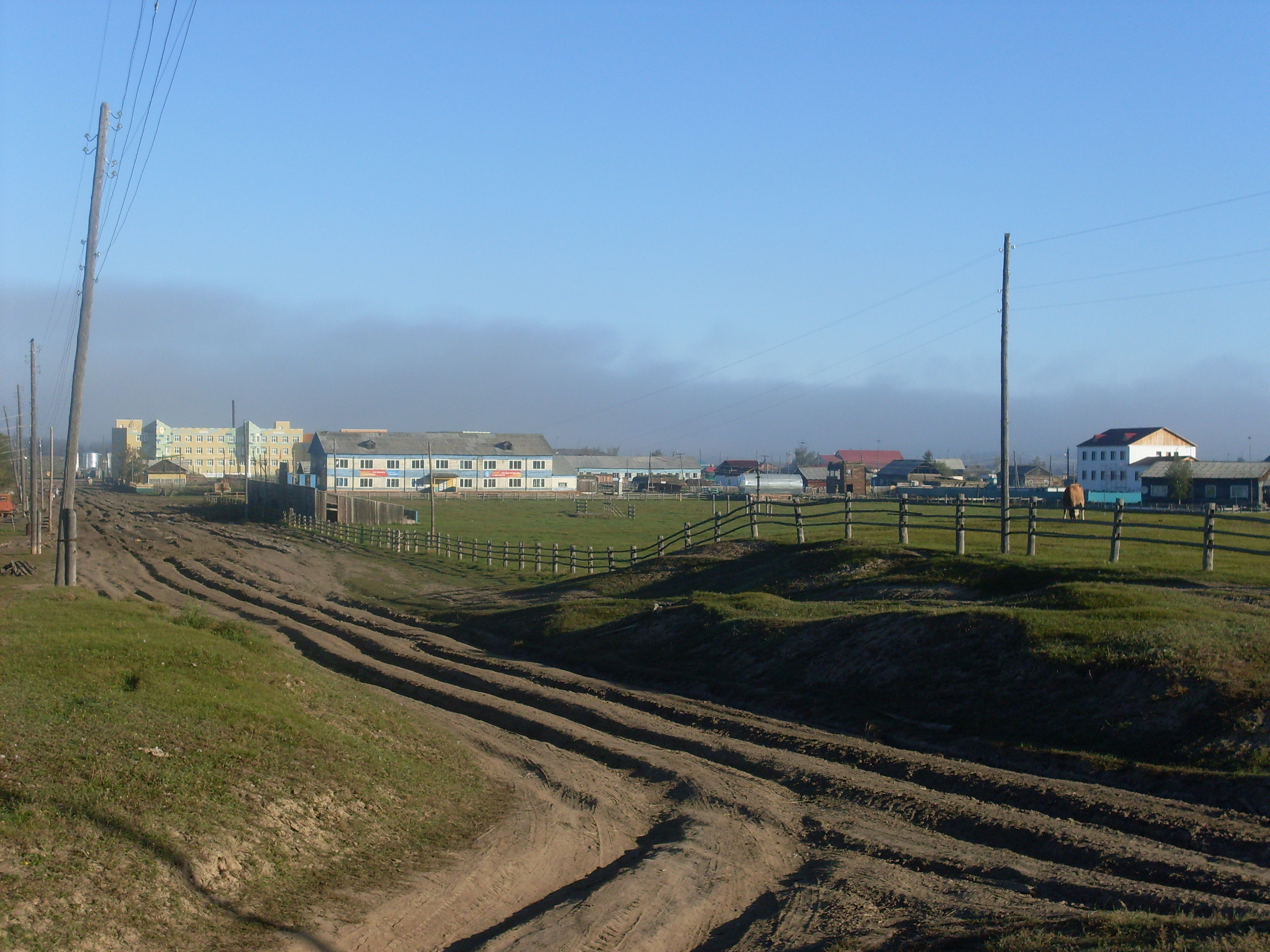 Вид с. Дябыла. Чурапчинский улус. РС(Я)